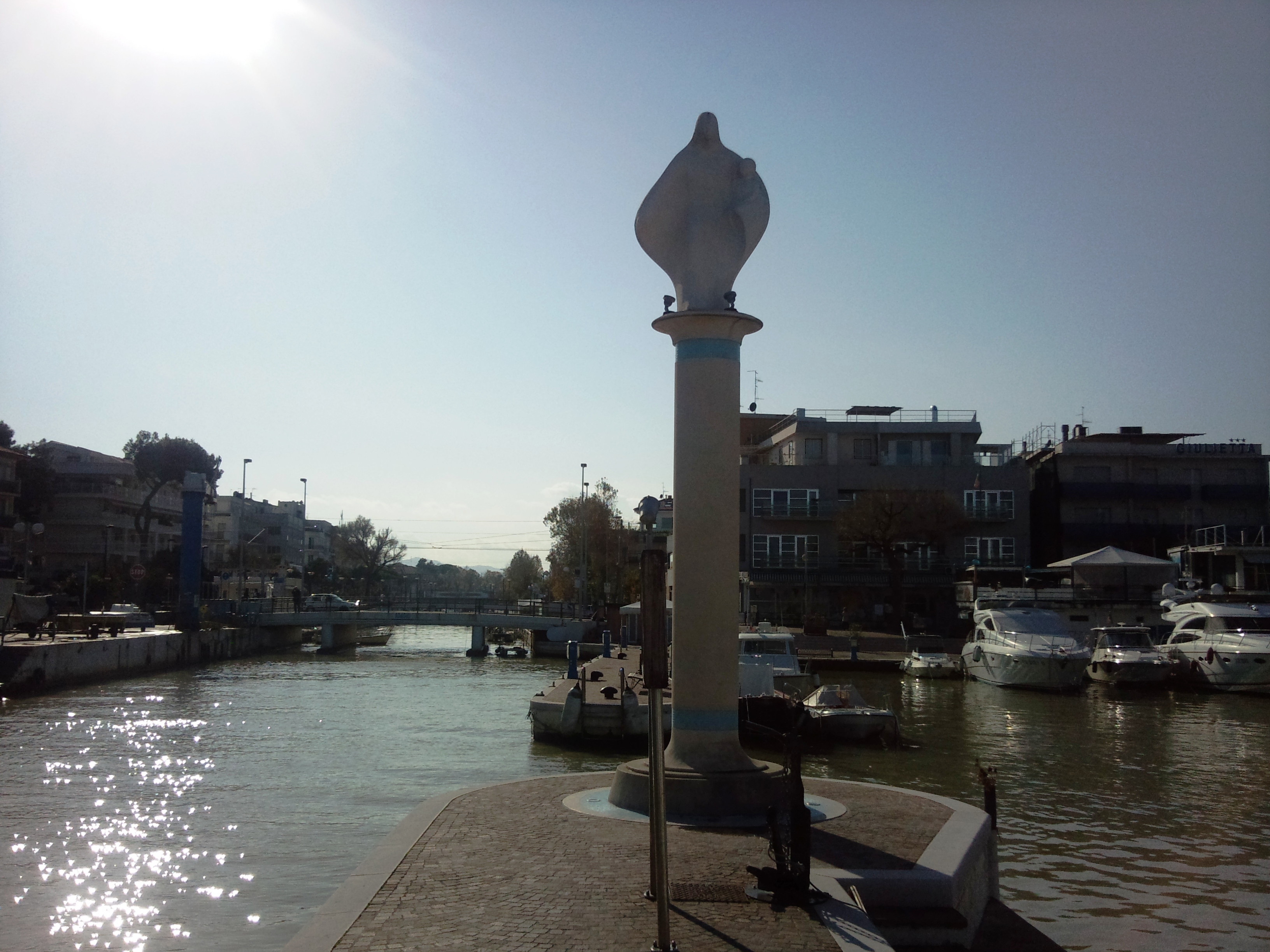 Foto scattata da me al porto di Riccione